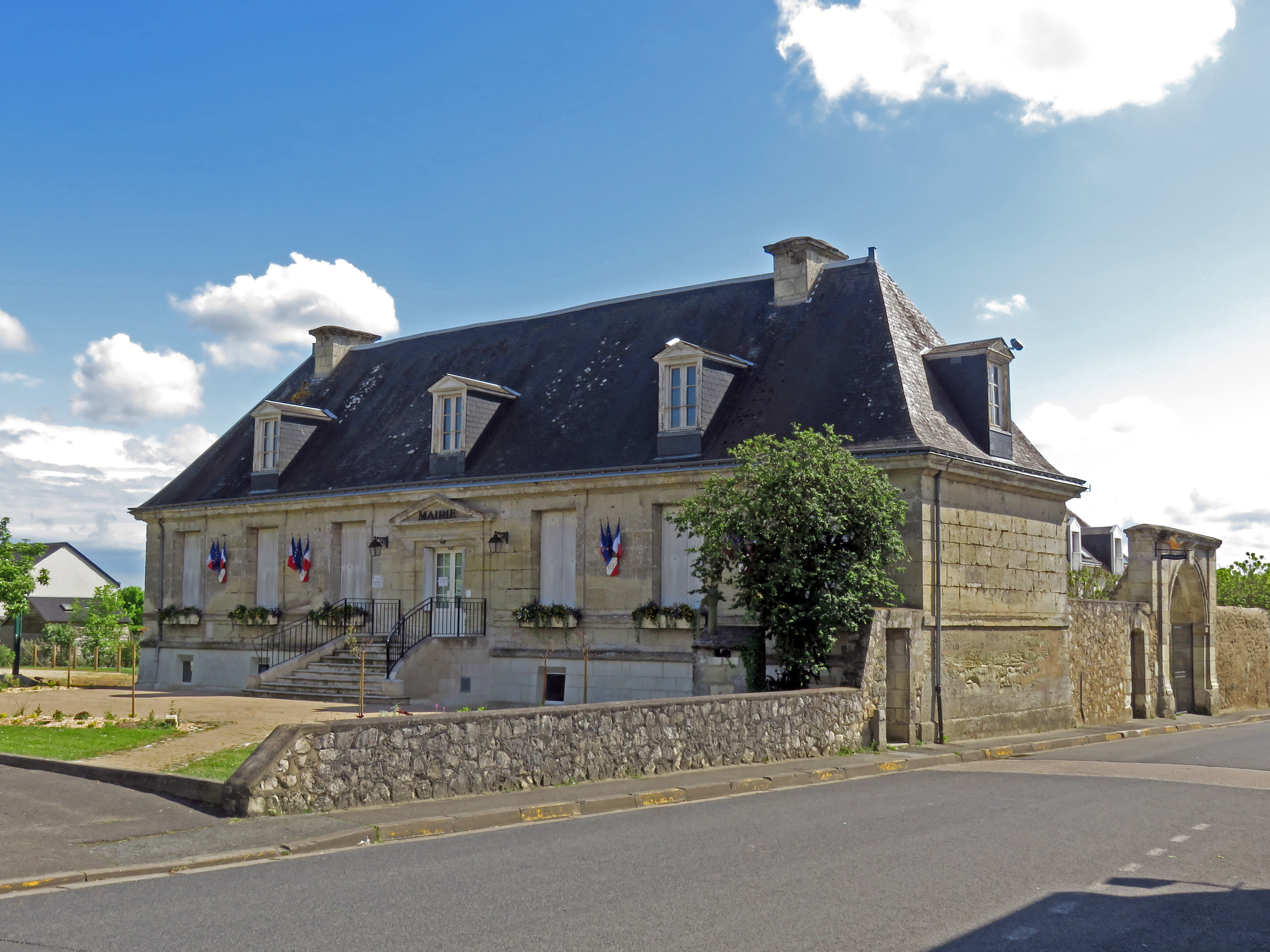 La Mairie de Parçay-Meslay.